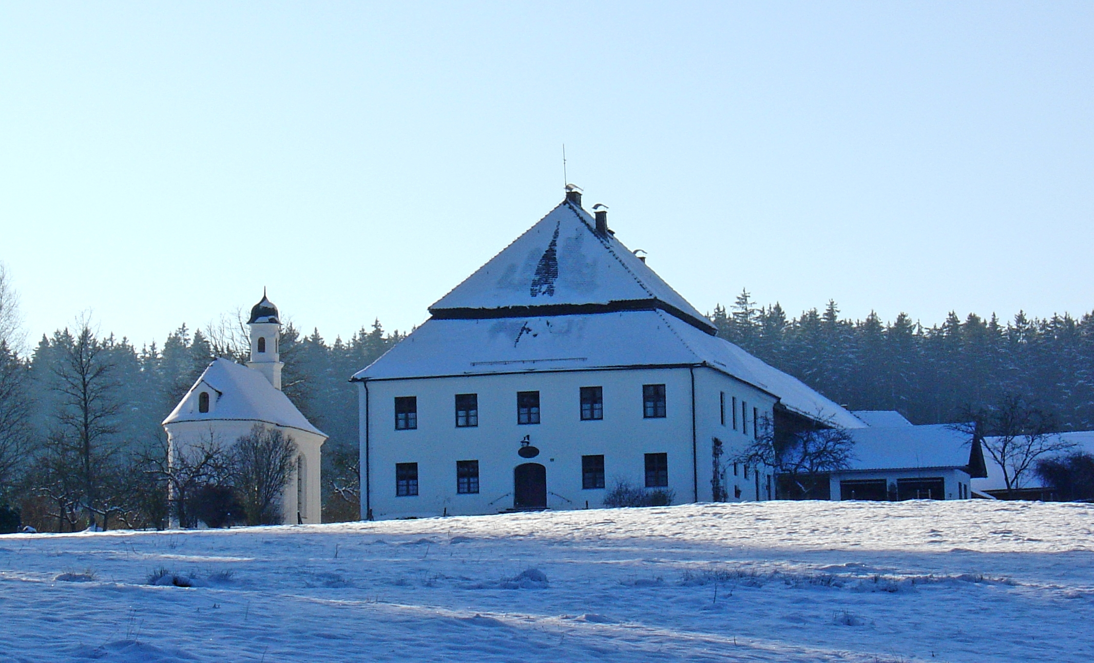 Grasleiten (Huglfing), Kapelle und Herrenhaus des Gutes im Winter.